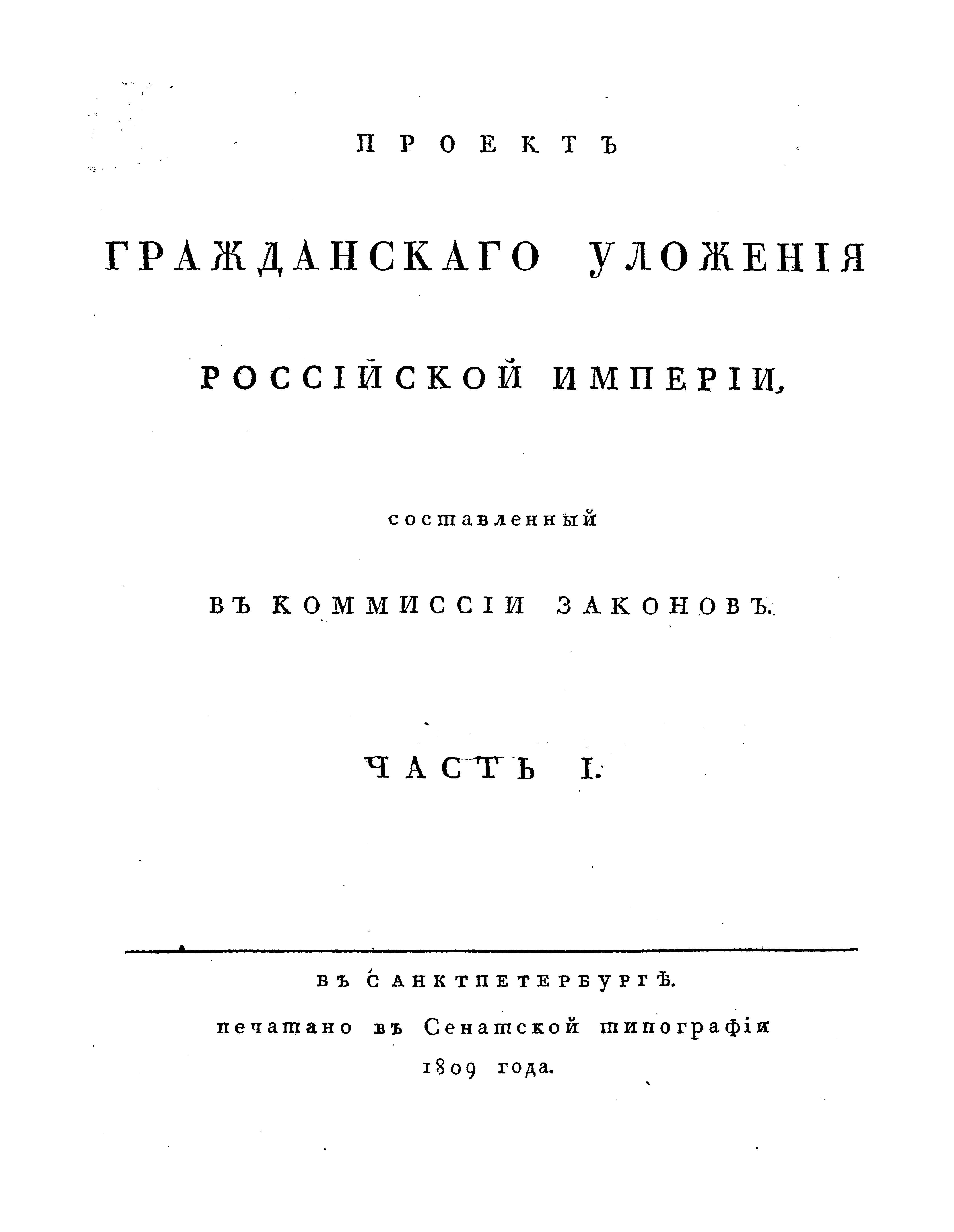 Проект Гражданского уложения